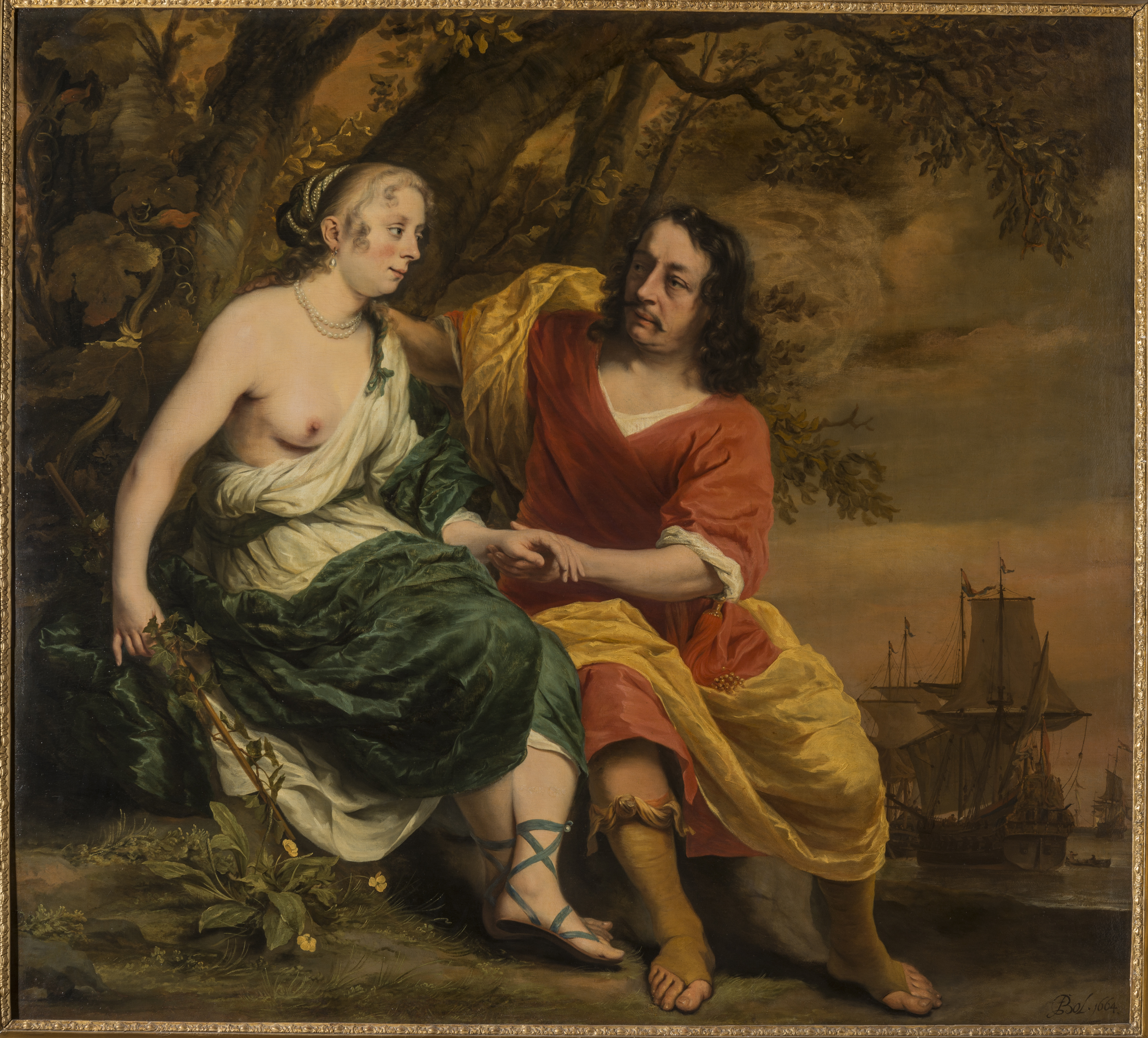 Huwelijksportret door Ferdinand Bol, het echtpaar mogelijk[1] weergegeven in de rollen van Jason en Medea, 1664. Portrait historié “Huwelijksportret van Helena van Heuvel en Leonard Winninx als Medea en Jason (?) door Ferdinand Bol 1664 Hermitage (Sint-Petersburg)” —Leonard Winninx